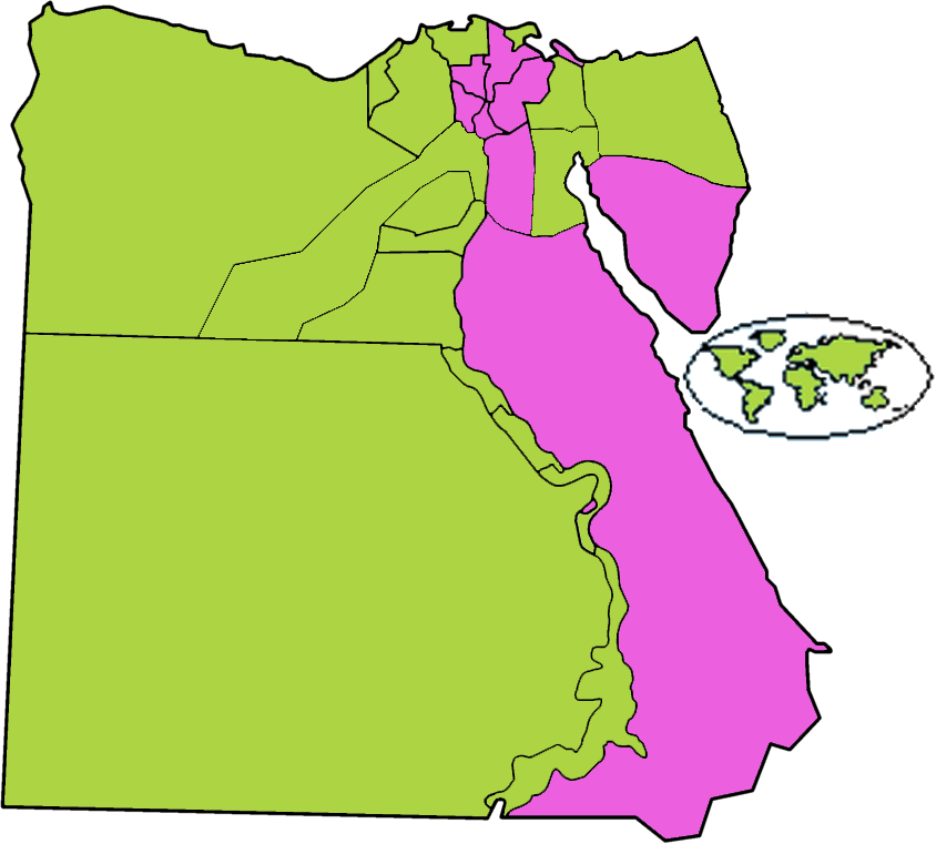 نتیجهٔ دور دوم انتخابات ریاست‌جمهوری مصر (۱۳۹۱) به تفکیک استان بر اساس نامزد برنده سبز: محمد مرسی ارغوانی: احمد شفیق